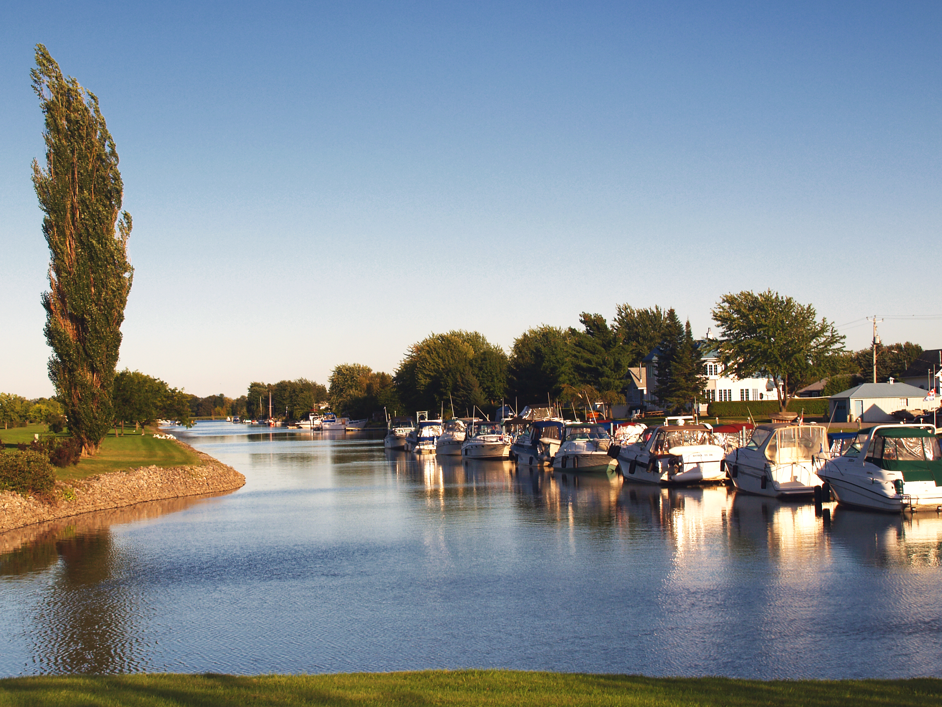 Saint-Paul-de-l'Île-aux-Noix (Québec) - Bassin entre Av. 61e et 60e